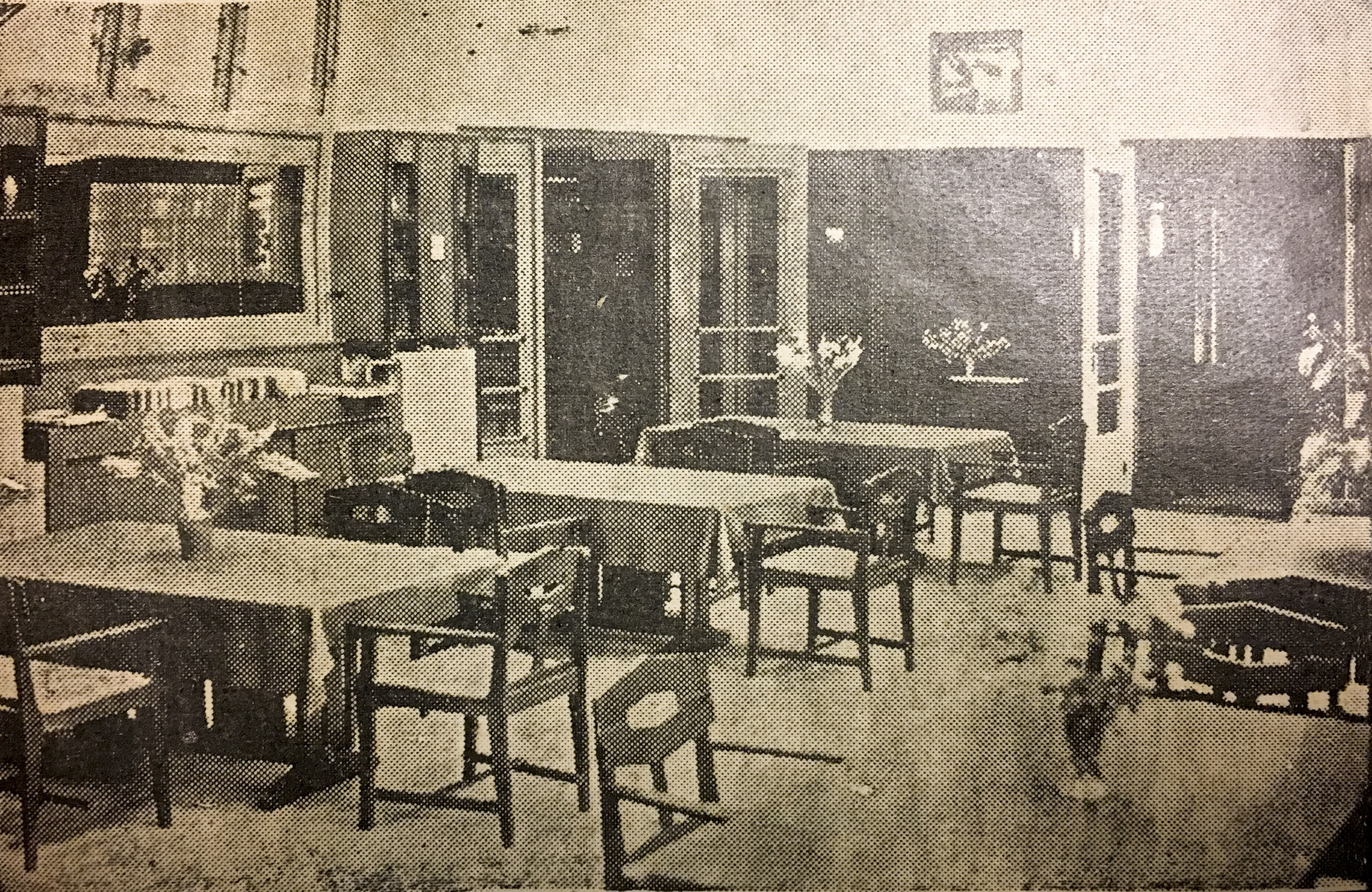 Foto uit de Twentsche Courant gemaakt kort na de opening van de eerst bibliotheek in Hengelo aan de Vondelstraat